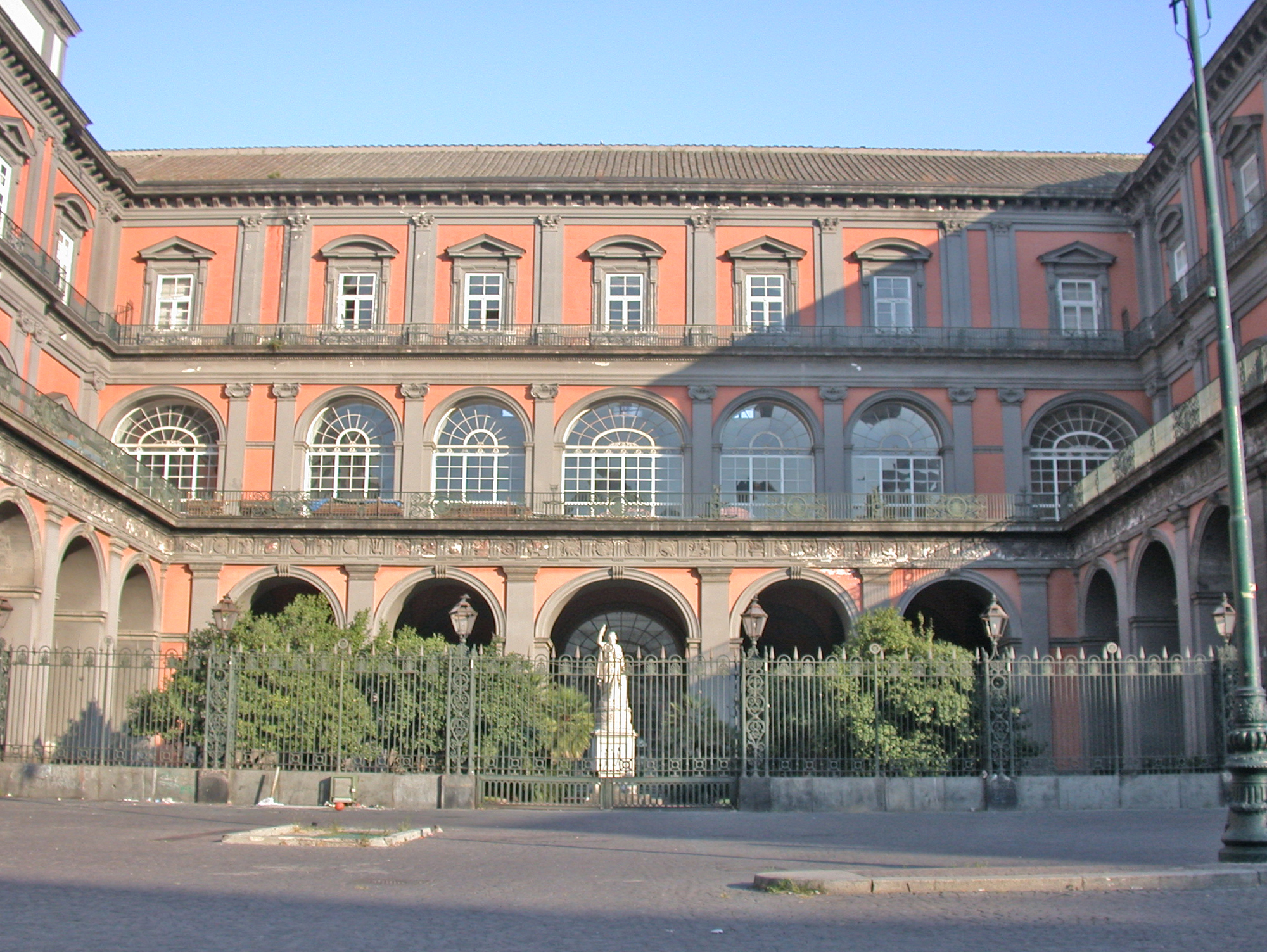 Palazzo Reale di Napoli, cortile e ingresso dal lato verso la Galleria Umberto I. La scultura è l'Italia di Francesco Liberti, ed è posta nel piccolo giardino laterale del palazzo: Giardino d'Italia.